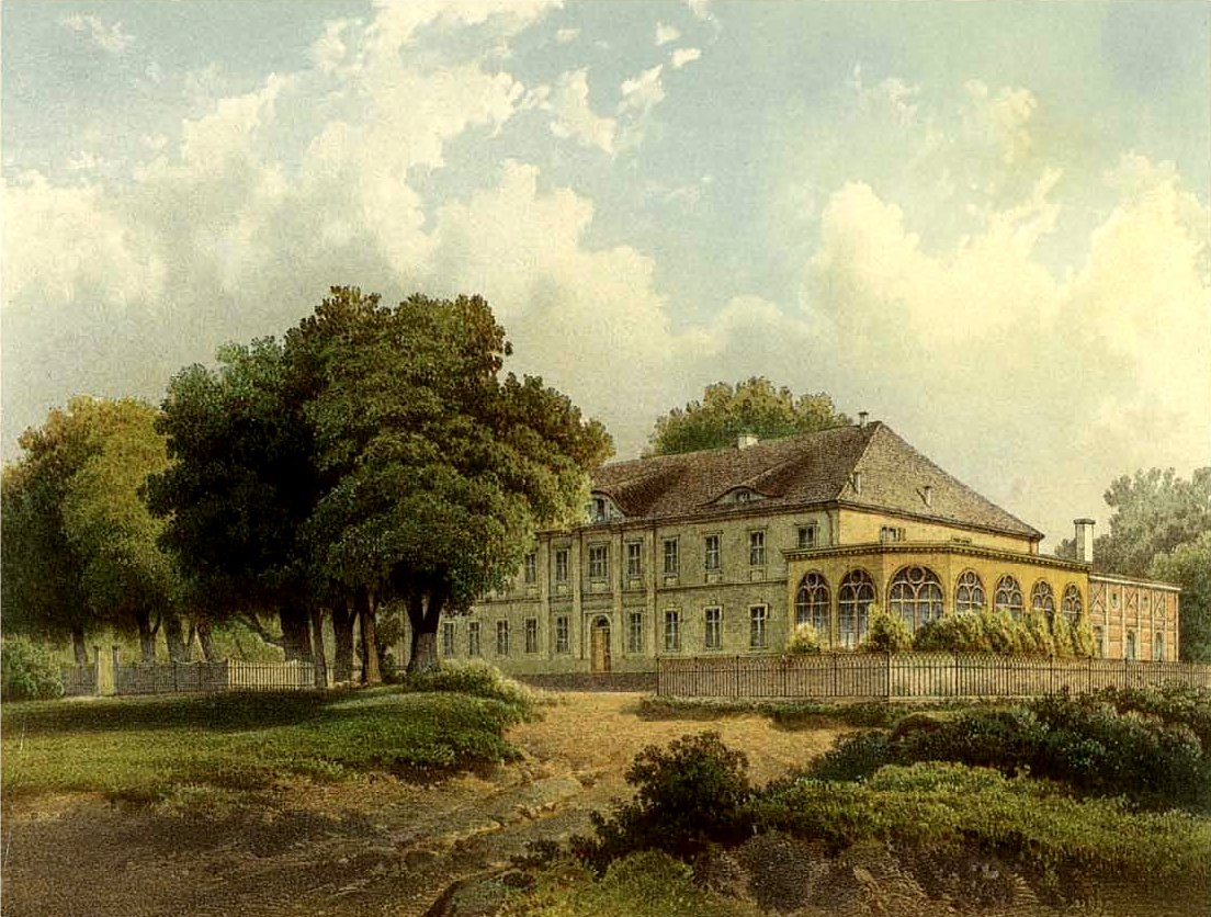 Schloss Kerstin, Provinz Pommern, Lithographie des 19.Jh.